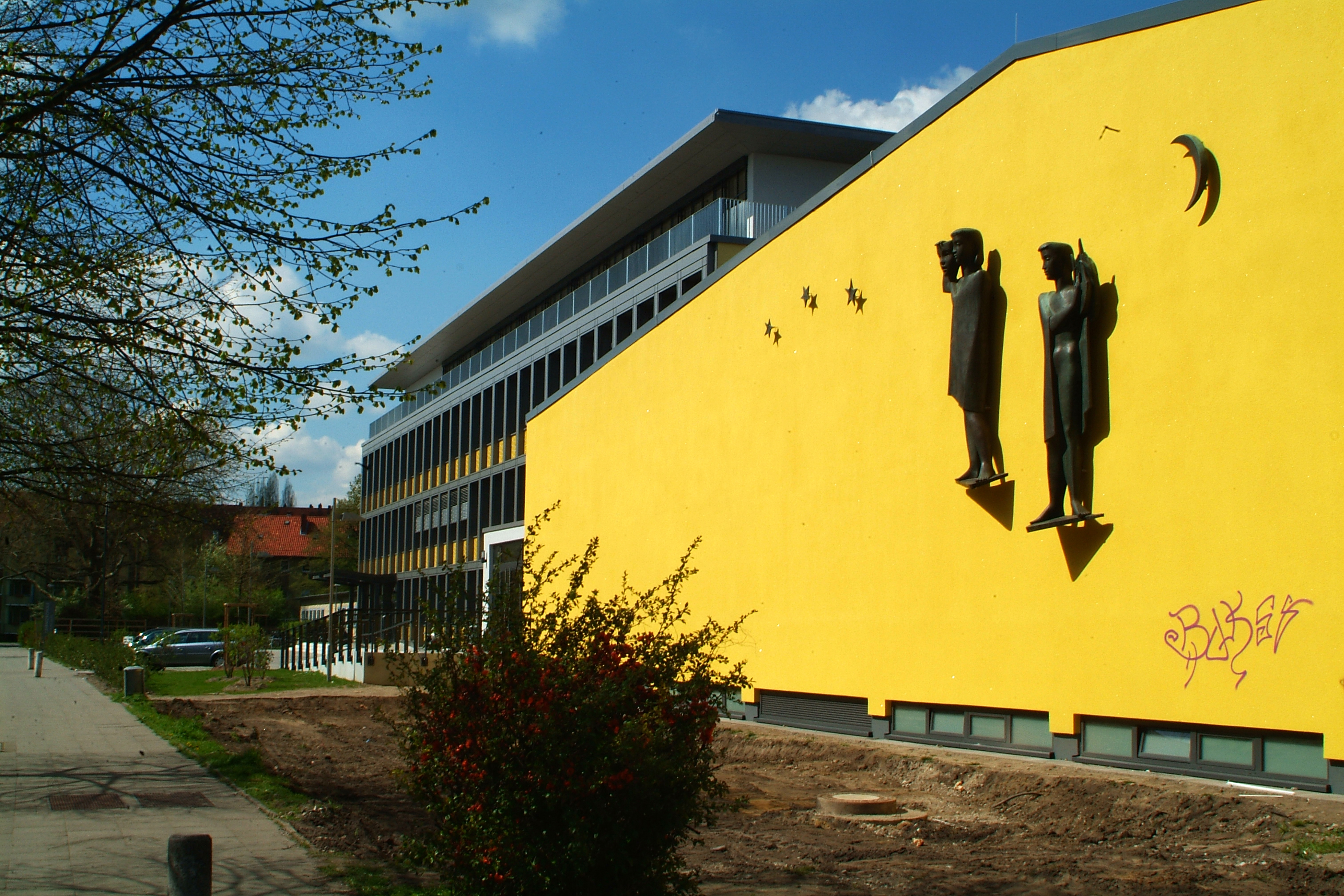 Die Skulpturengruppe "Schauspiel und Musik" von Hermann Scheuernstuhl von 1955 wurde an der Aula der Leibnizschule in Hannover, Röntgenstraße 8 installiert. Kaum war die Aussenfassade der Aula saniert, fand sich vor Abschluß der Bauarbeiten offensichtlich ein weiterer "Künstler", der uns eine Nachricht durch sein Graffiti zukommen ließ.